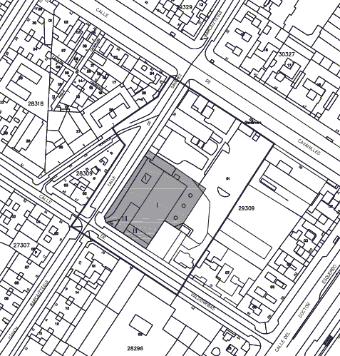 Localización del bien de interés cultural descrito en la Resolución de 22 de marzo de 2012, de la Dirección General de Patrimonio Histórico, por la que se incoa el expediente para la declaración de Bien de Interés Cultural, en la categoría de Monumento, de la Antigua Central Eléctrica de Pacífico, Madrid.